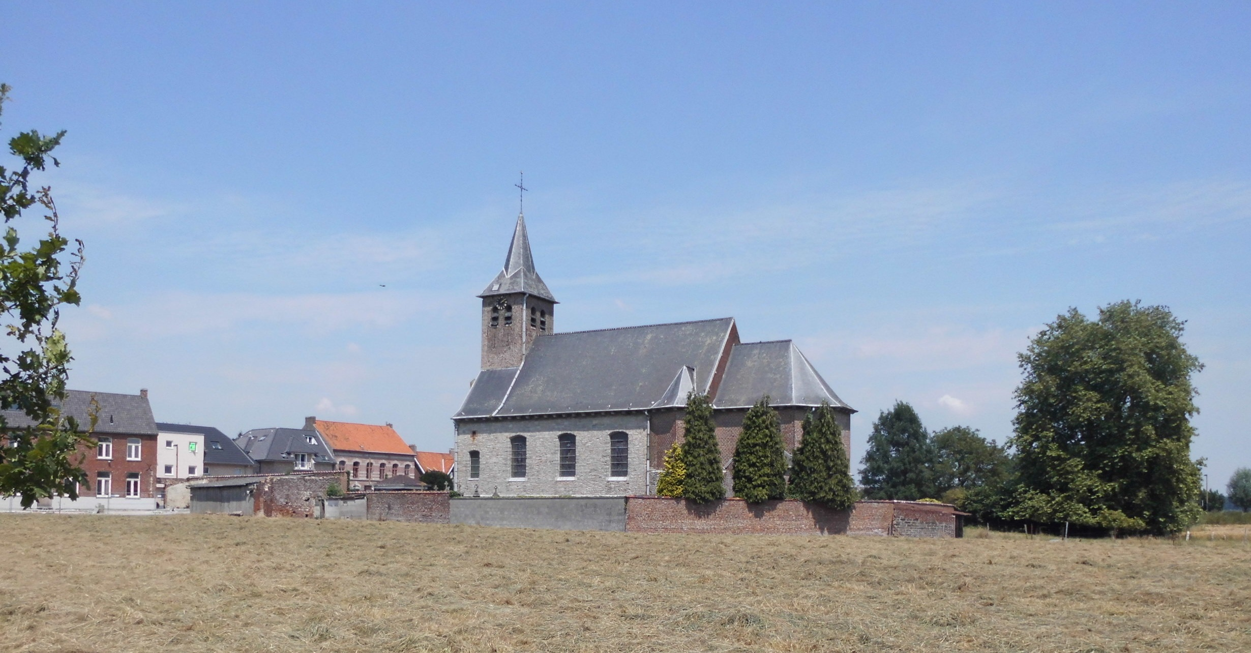 Sint-Jan-de-Doperkerk - Gemeenteplein - Helkijn - Spiere-Helkijn - West-Vlaanderen - België